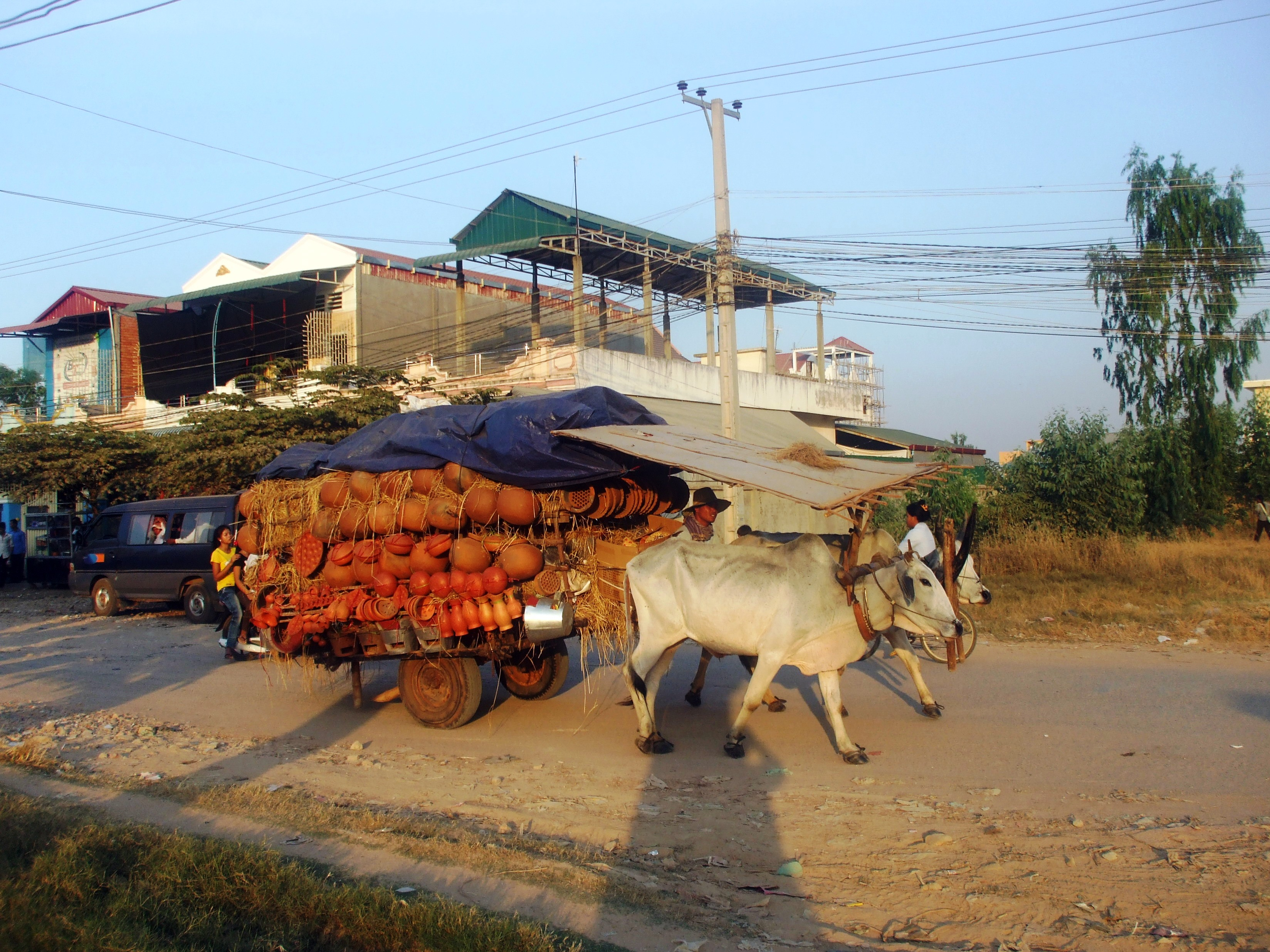 Bò dùng để chuyên chở tại Phnôm Pênh (Campuchia).